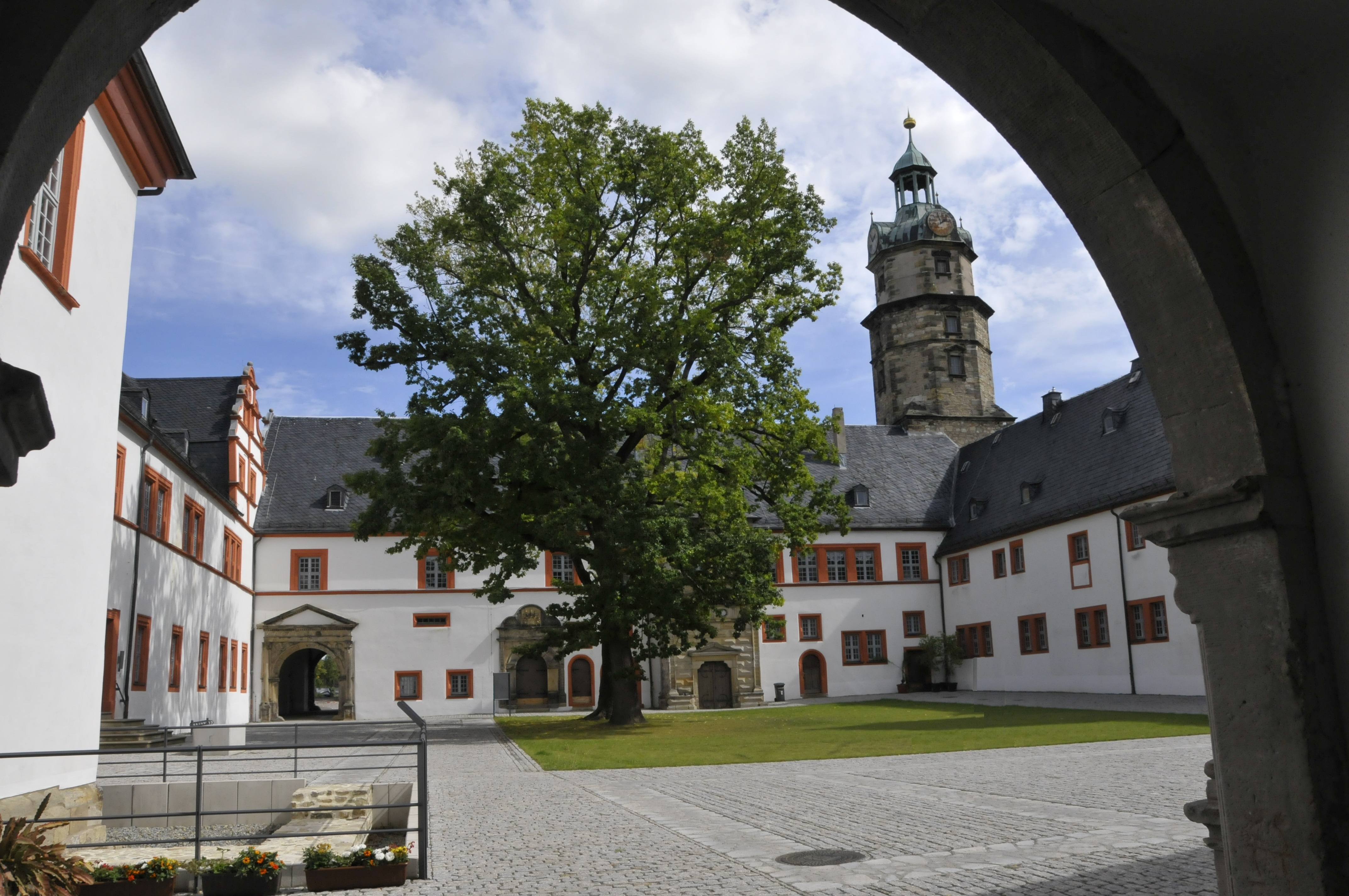 Ohrdruf, Schlosshof